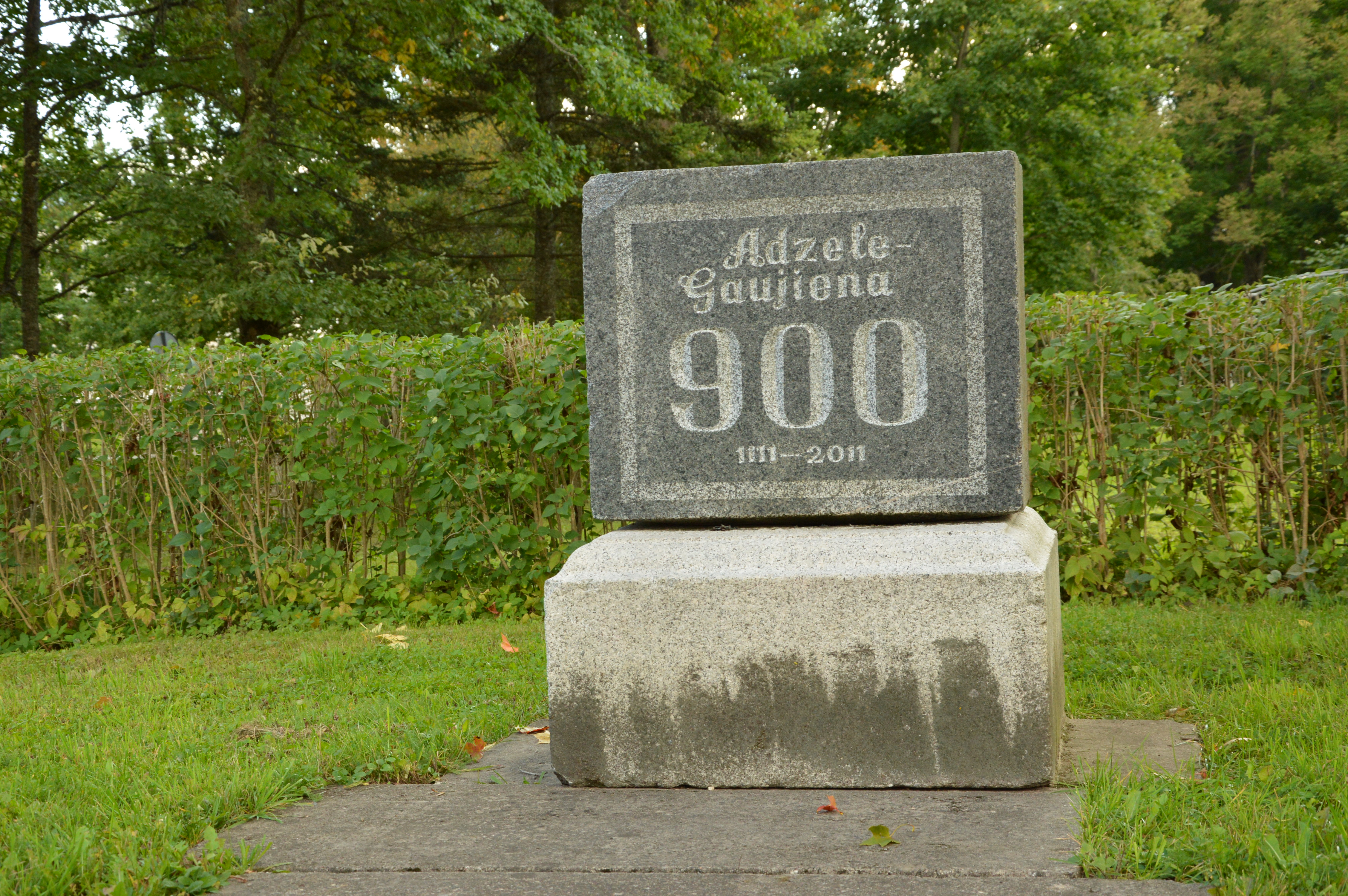 Koivaliina 900 mälestuskivi